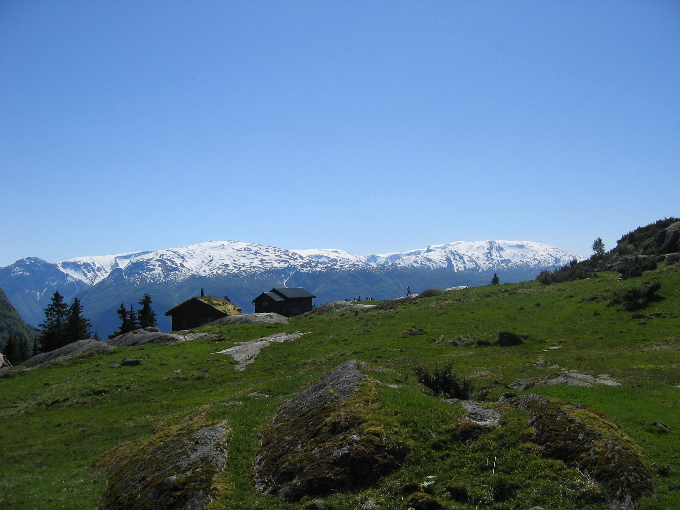 Stølen Skagasete i Leikanger kommune